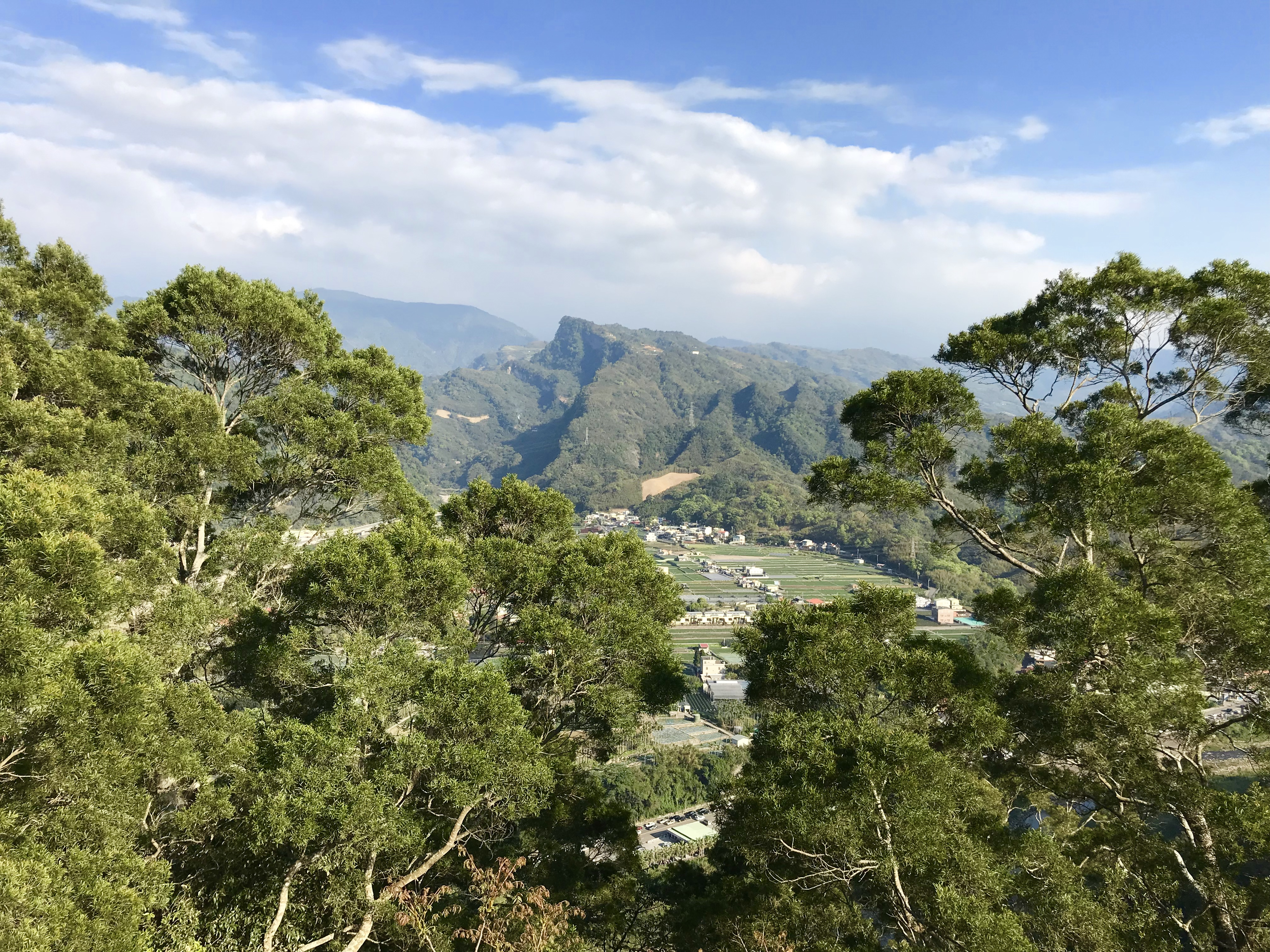 中文（台灣）: 大湖法雲禪寺前鷂婆山